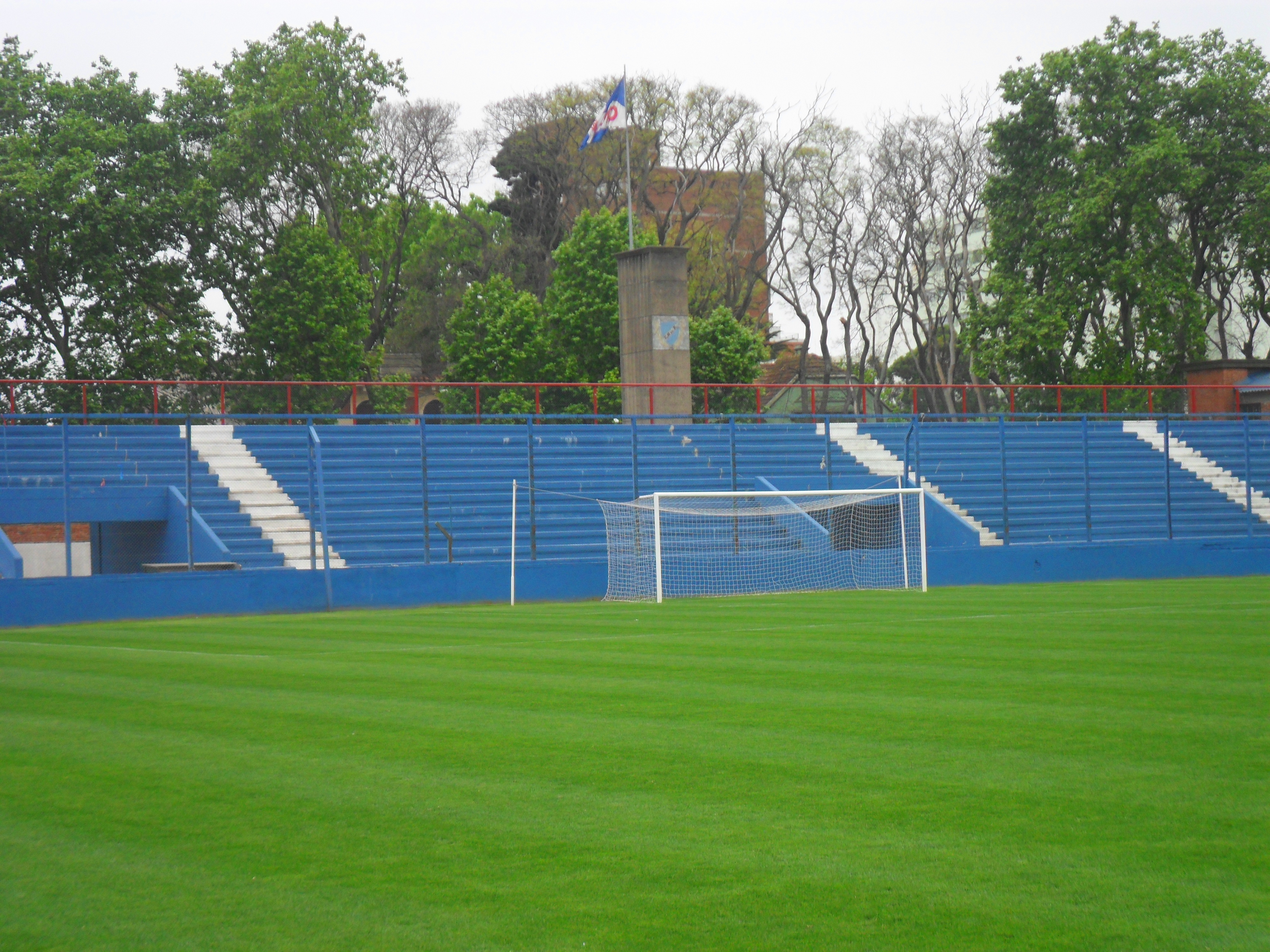 Tribuna Héctor Scarone antes de la ampliación (en el Día del patrimonio, año 2011)